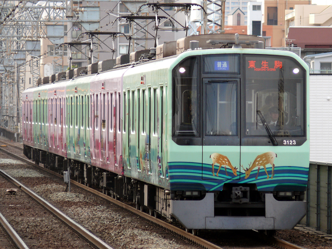 Kintetsu 3220